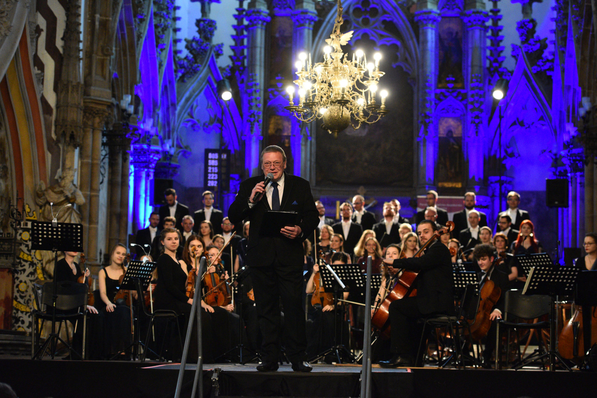 Legnica Cantat 50, rok 2019. Koncert jubileuszowy na 50-lecie w kościele ewangelickim Marii Panny. Wykonawcy: Chór Narodowego Forum Muzyki, Kameralna N-Harmonia (dyr. Agnieszka Franków-Żelazny).